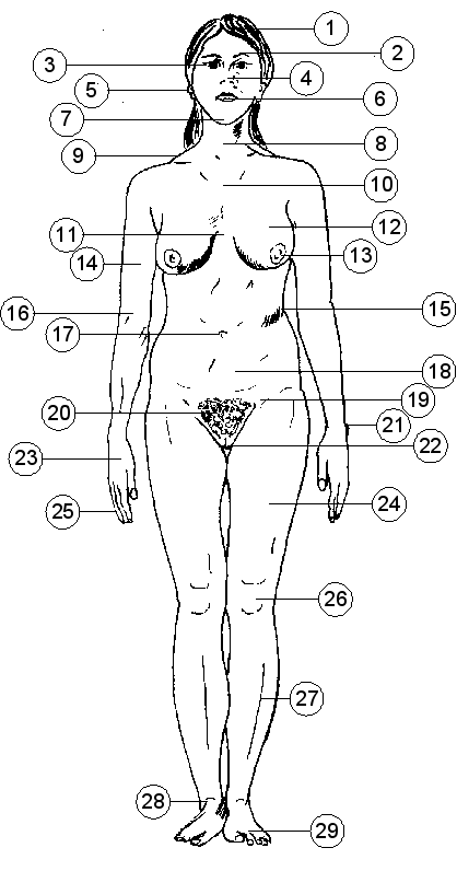 Frau von vorne